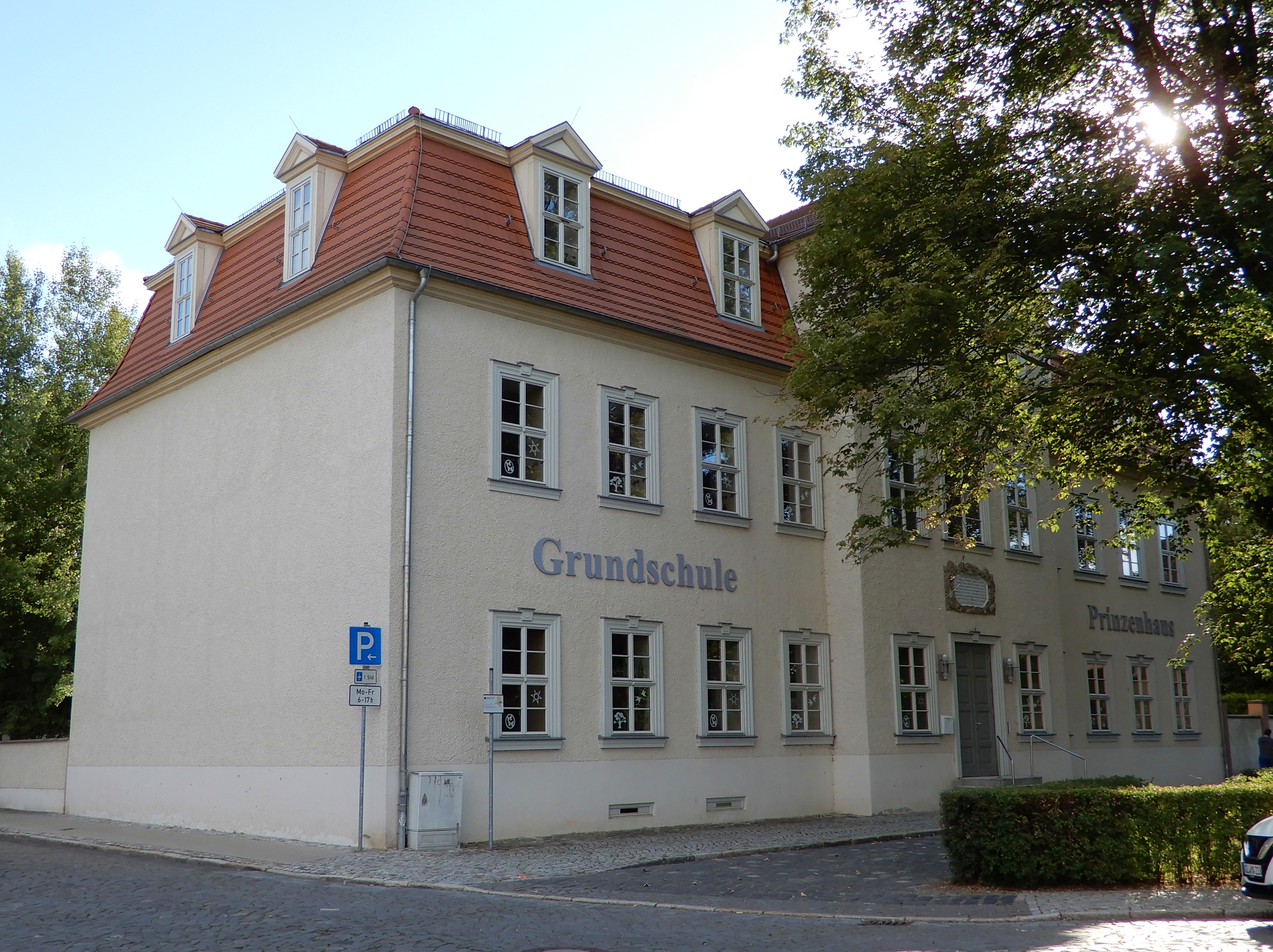 Grundschule Prinzenhaus am Schlossplatz 1